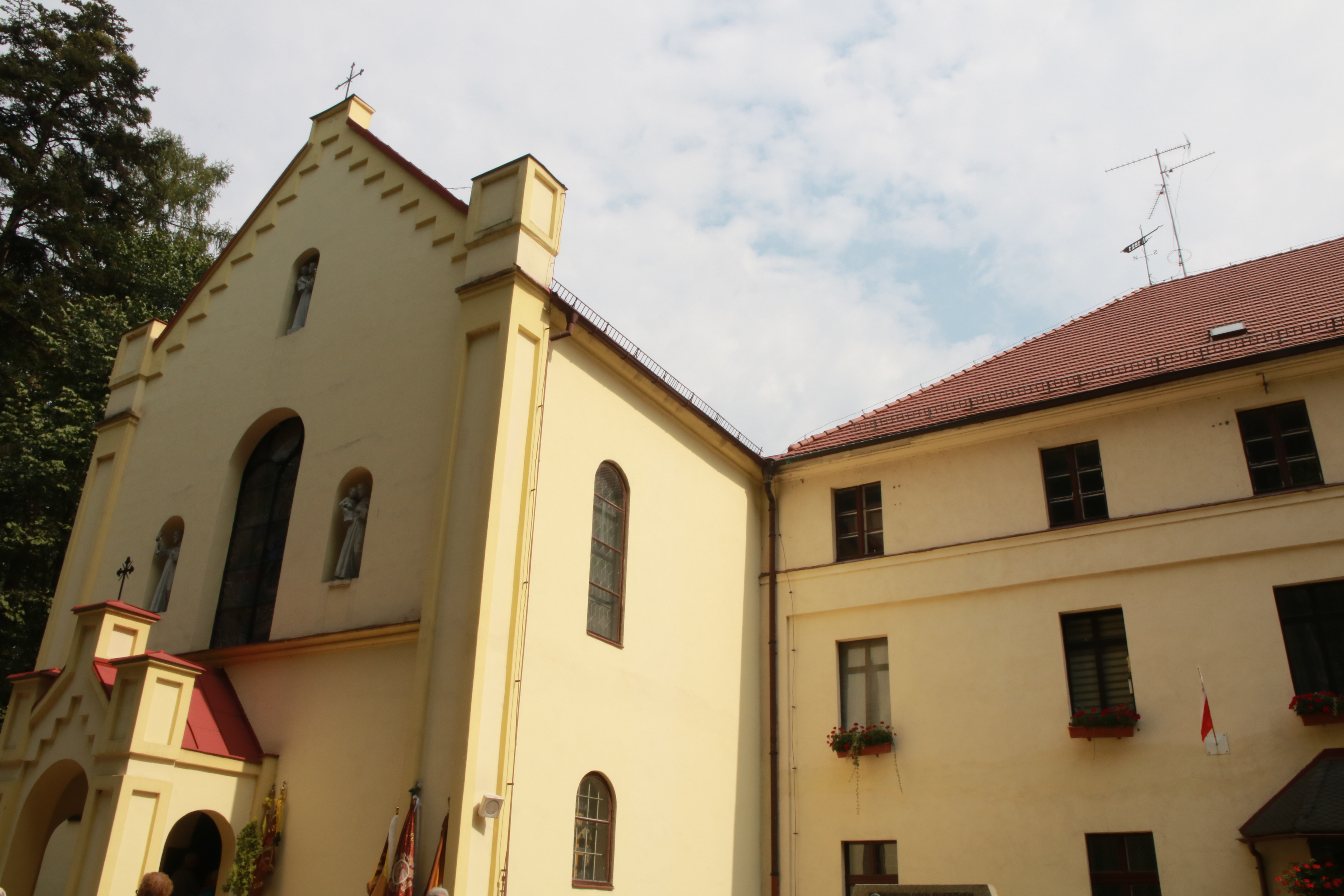 Kościół filialny pod wezwaniem św. Józefa w Prudniku-Lesie.